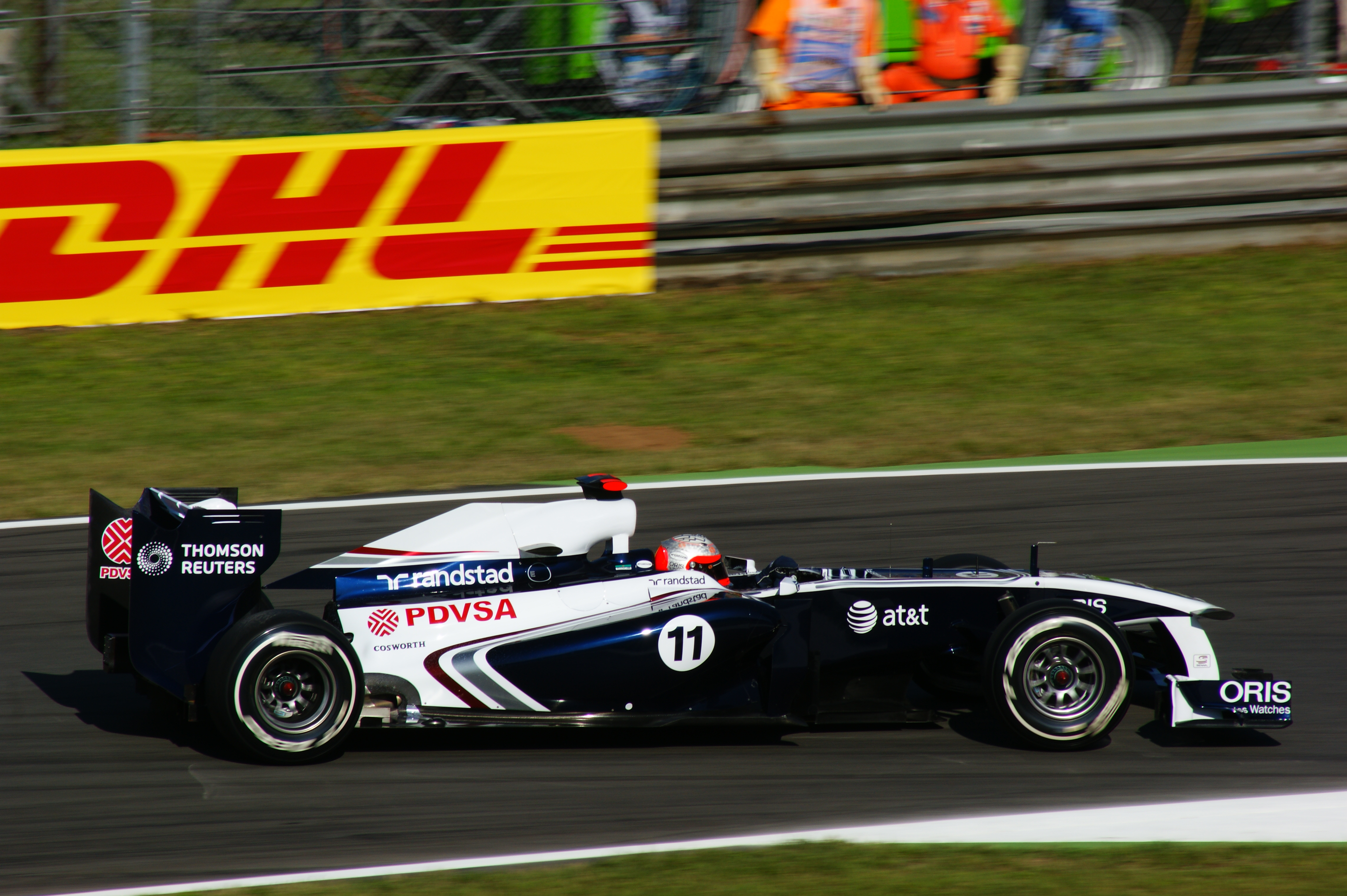 Rubens Barrichello alla prima variante Monza 2011